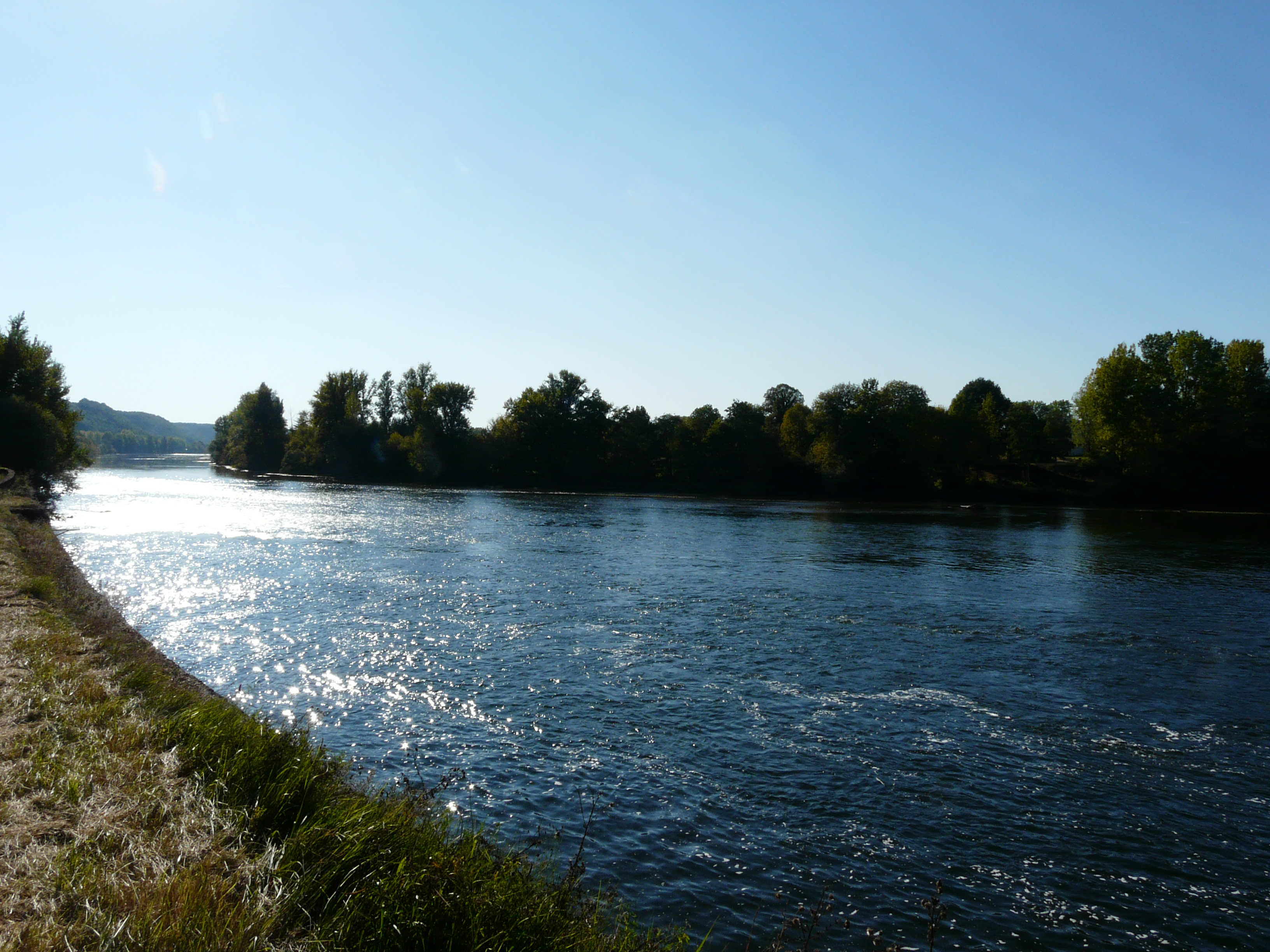 La Dordogne en aval immédiat de la centrale hydroélectrique de Mauzac, Badefols-sur-Dordogne, Dordogne, France.